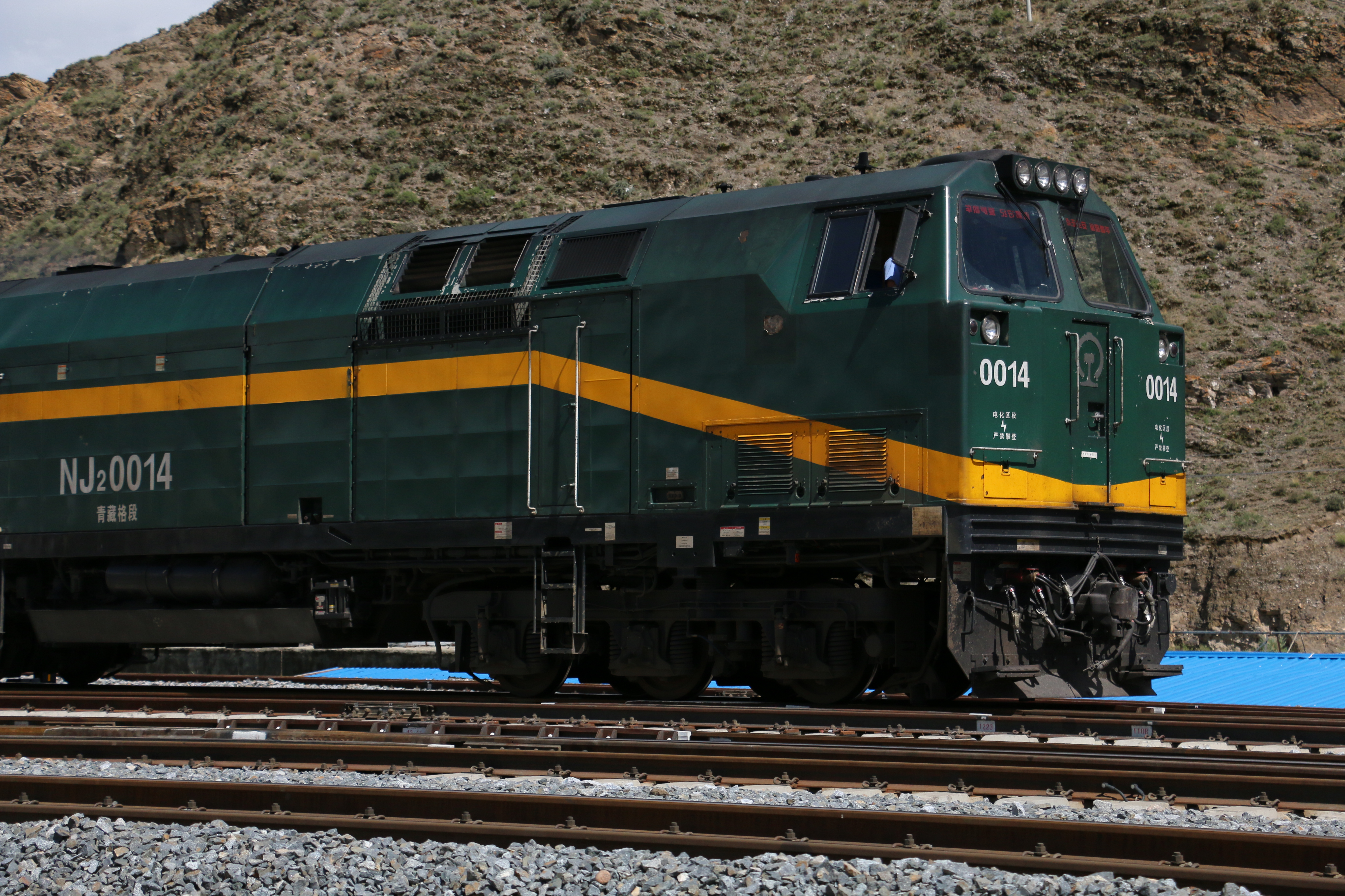 中文（中国大陆）: NJ2-0014于拉萨站西侧